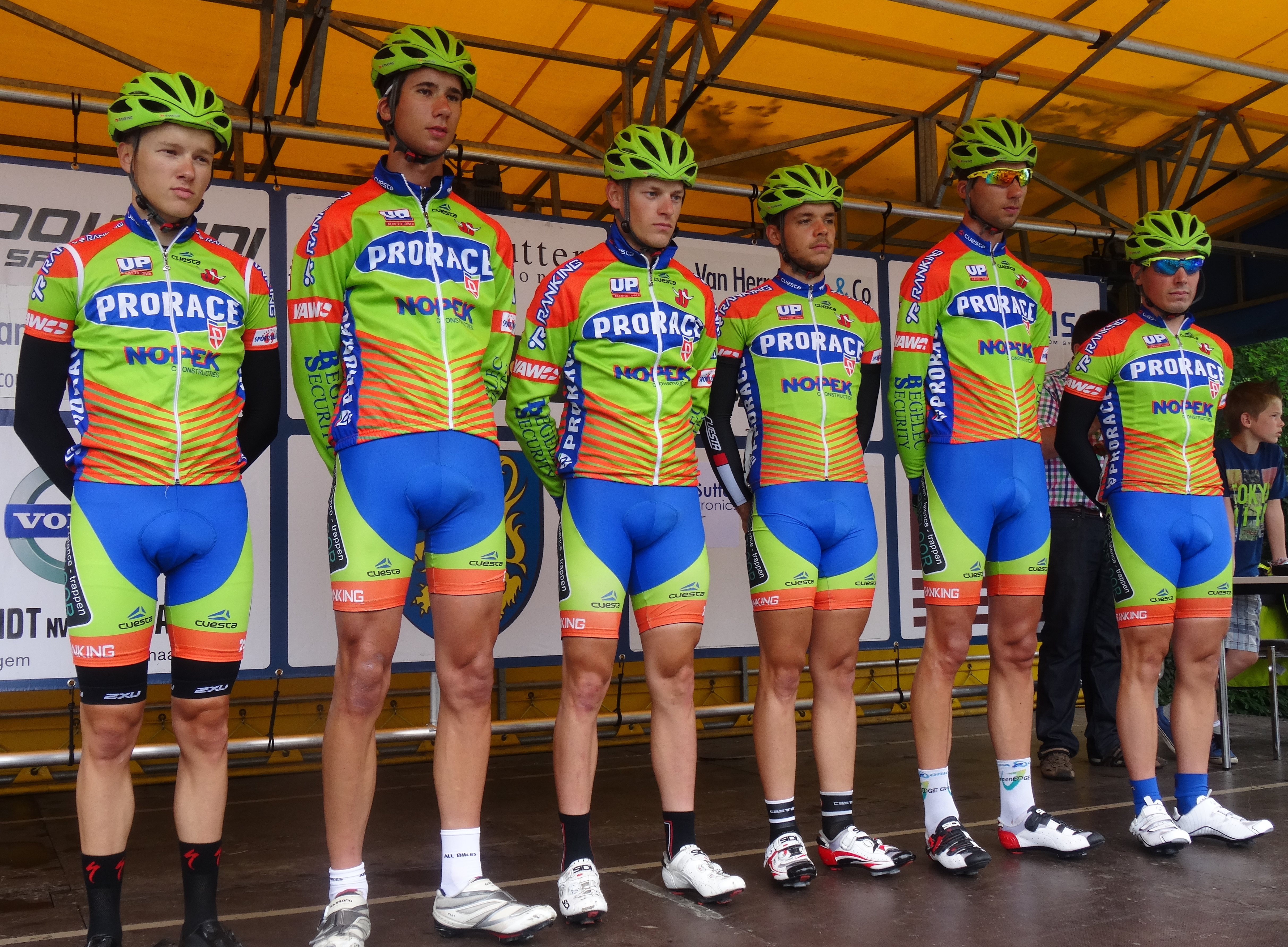 Reportage photographique réalisé le samedi 5 juillet à l'occasion du départ et de l'arrivée du Circuit Het Nieuwsblad espoirs 2014 à Grotenberge (Zottegem), Belgique.